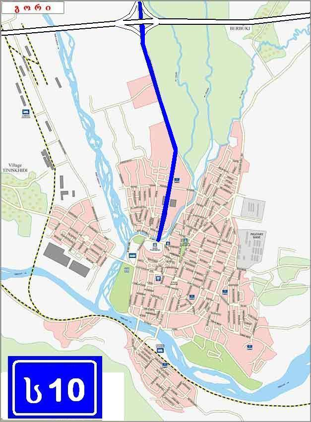 საქართველოს საავტომობილო მაგისტრალი ს10 გორში